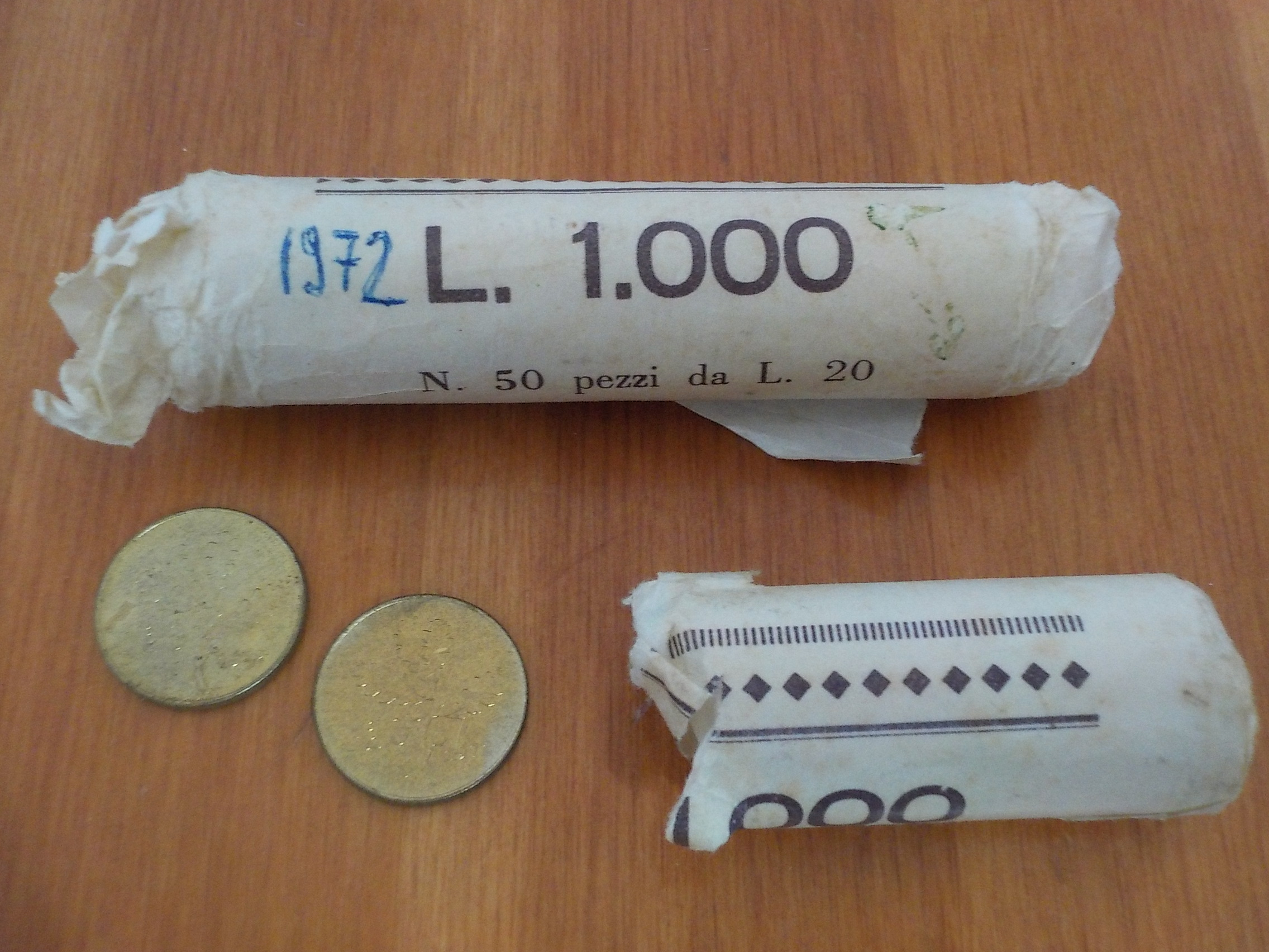 Rotoli di carta usati in banca per le monete (50 pezzi da 20 lire), 1972